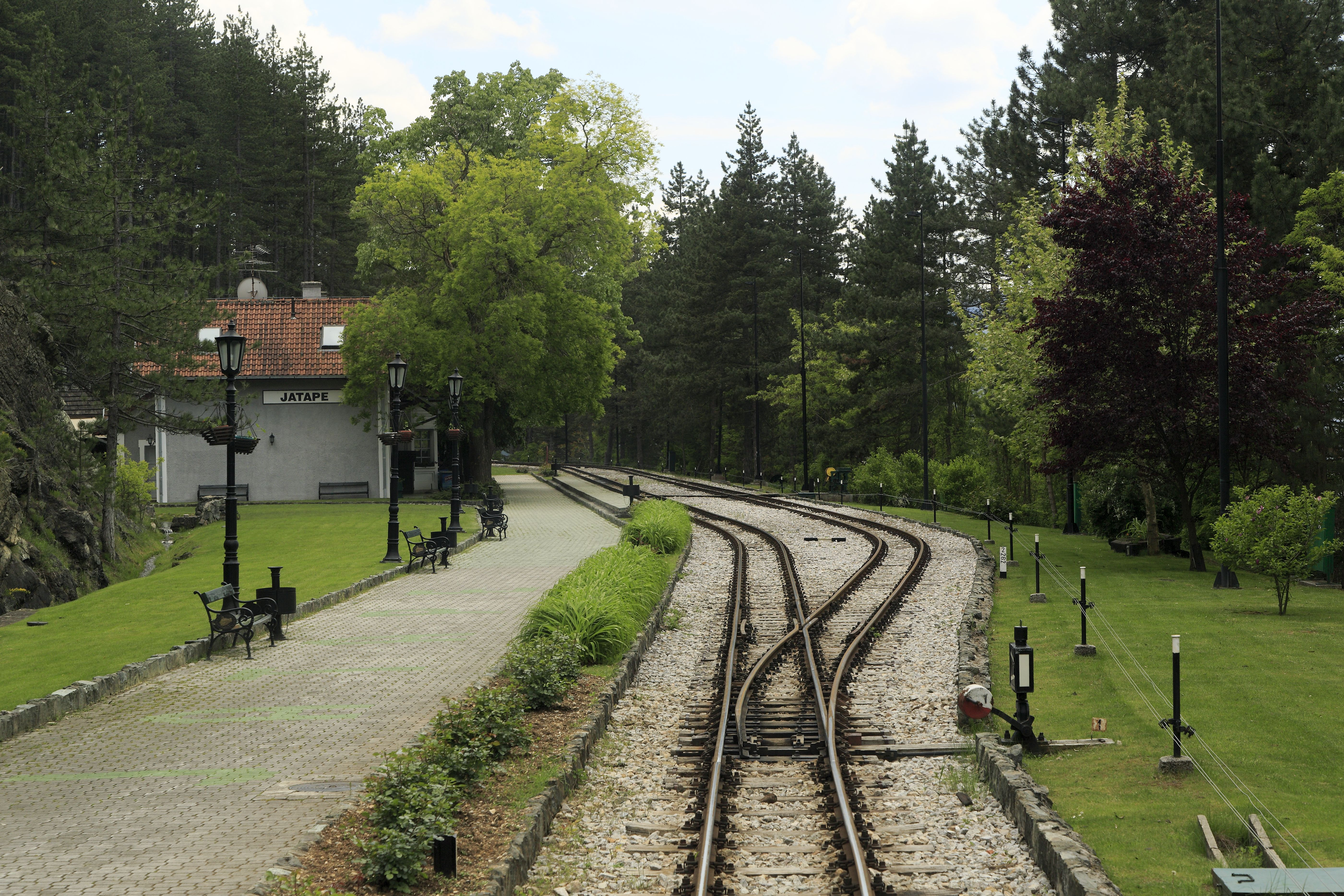 Eine Ansiedlung gibt es hier nicht, der Bahnhof entstand nur als Kreuzungsmöglichkeit etwa in der Mitte zwischen Mokra Gora und Šargan-Vitasi zur Erhöhung der Durchlassfähigkeit. Die Straßenzufahrt wurde erst beim Wiederaufbau als Museumsbahn eingerichtet.